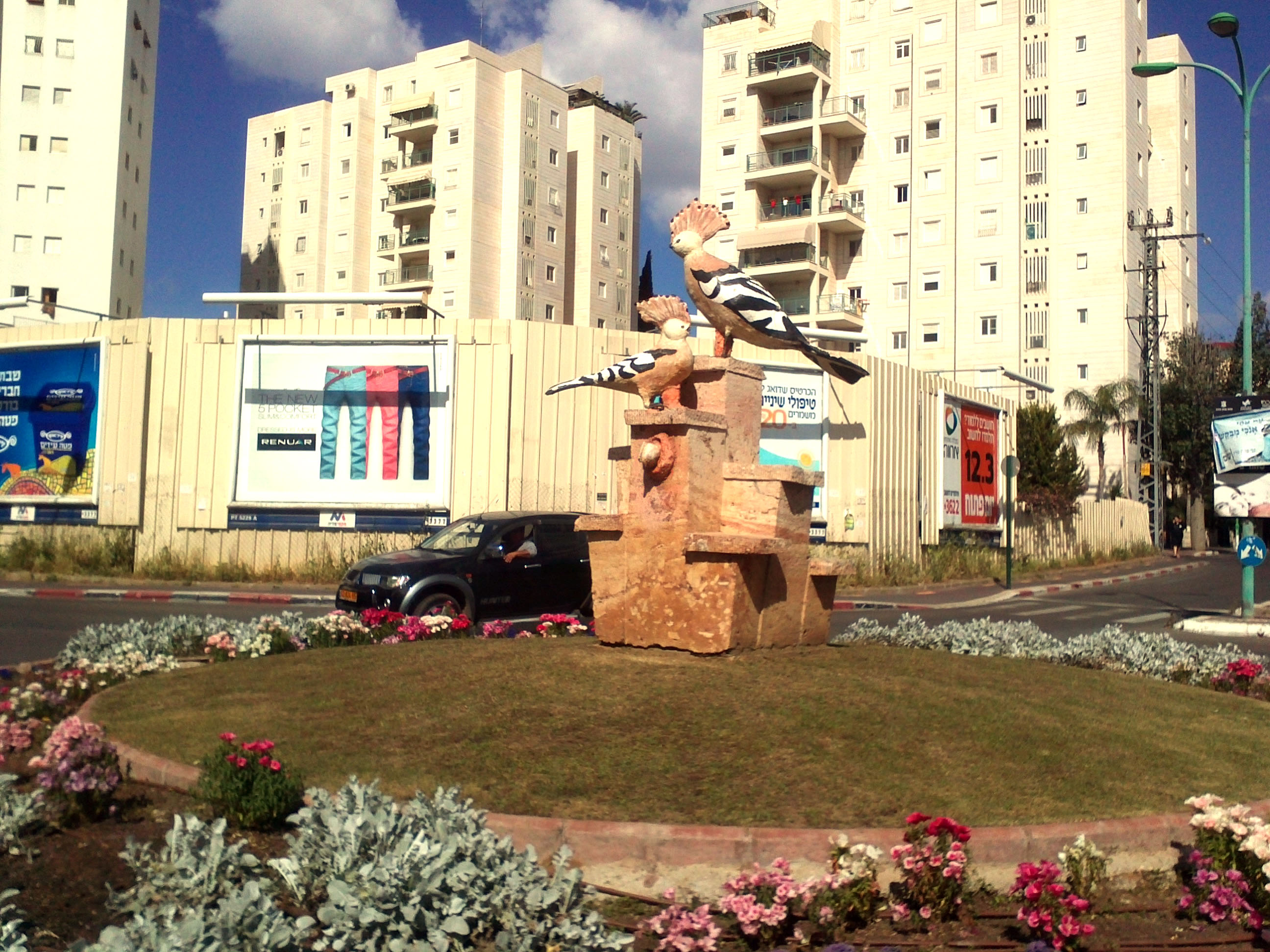 Памятник удоду на ул. Ротшильд в Петах Тикве.